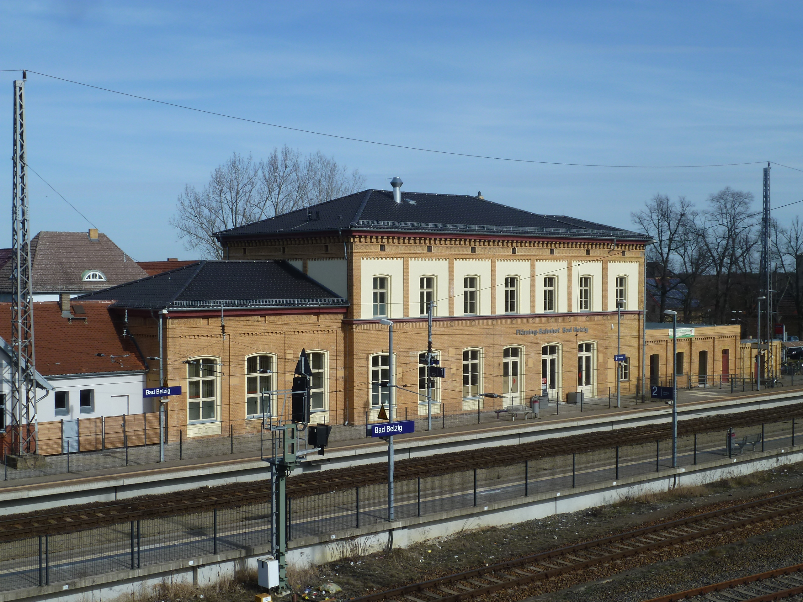 Bahnhof Belzig, Blick von FußgängerbrückeUnknown belzig railway station, view from pedestrian bridge